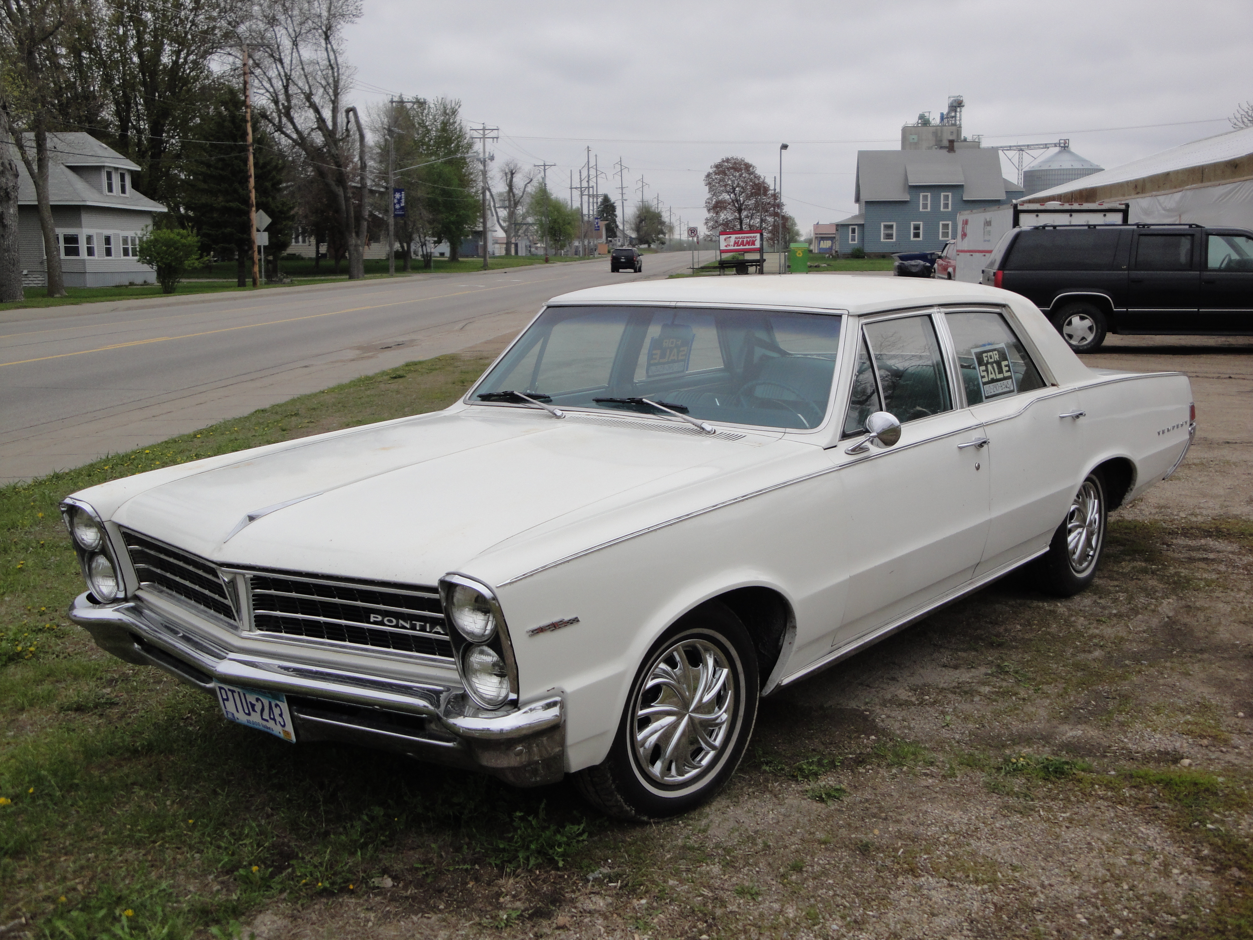 65 Pontiac Tempest Custom